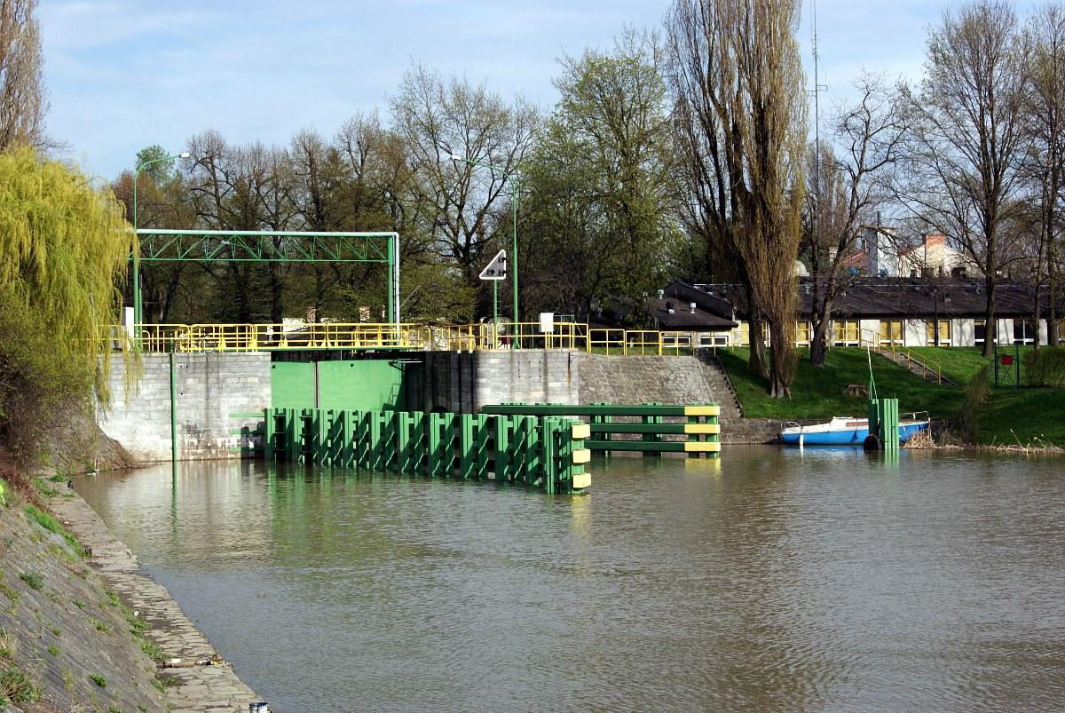 Śluza Szczytniki (stanowisko górne).